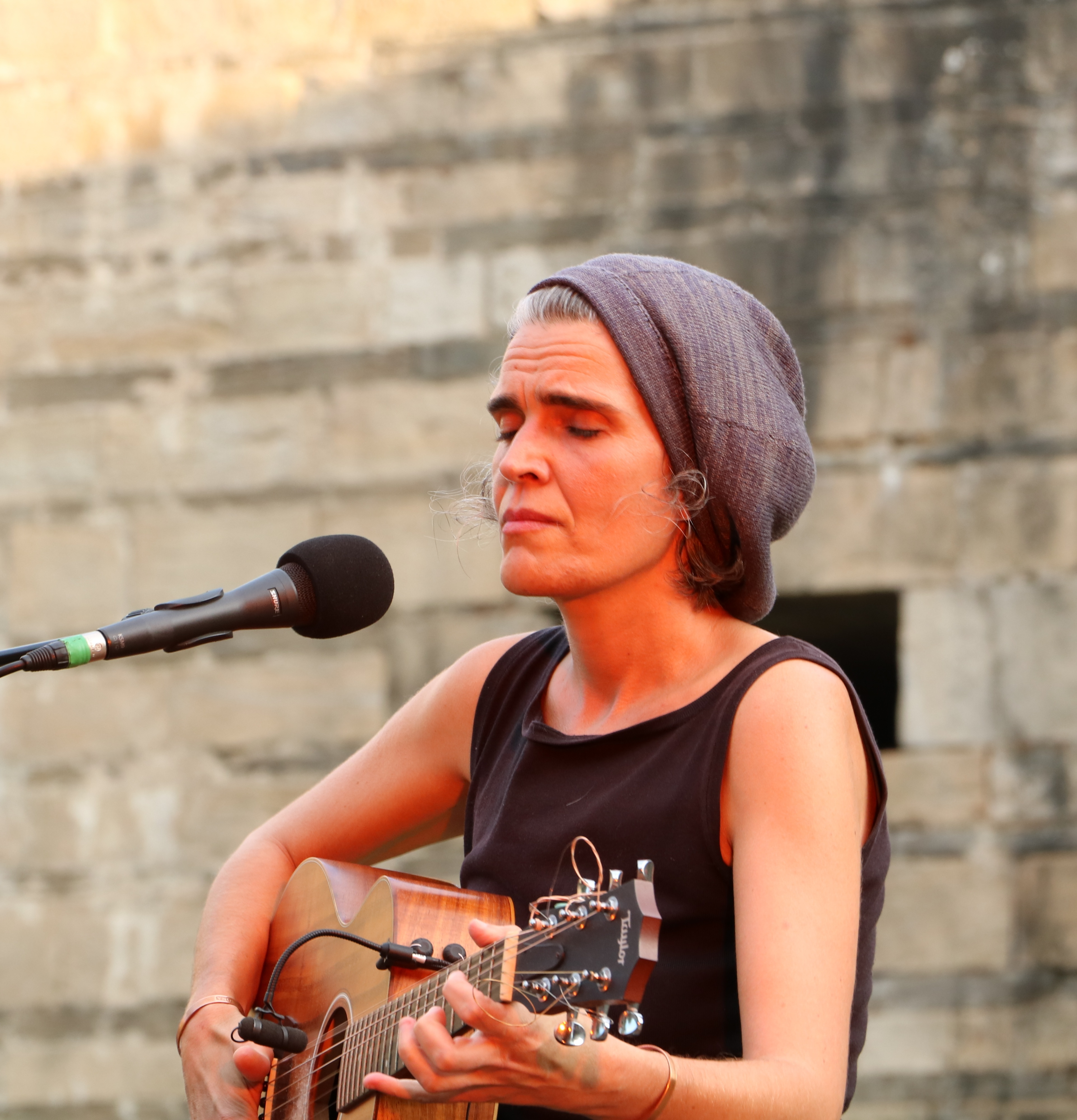 Concert Lula Pena- Nantes - Festival Aux Heures d'Eté